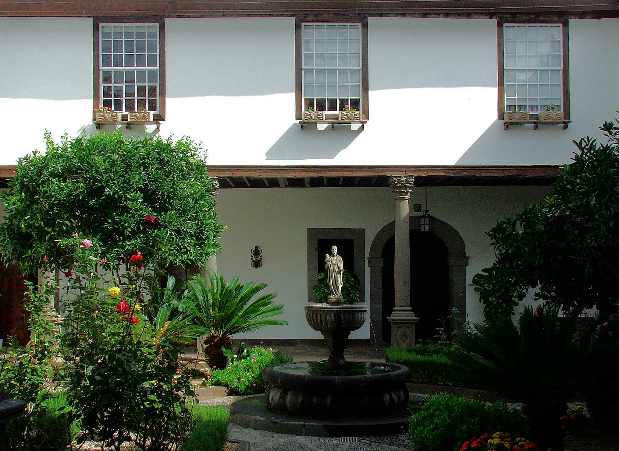 Casa Salazar antes del incendio, La Laguna